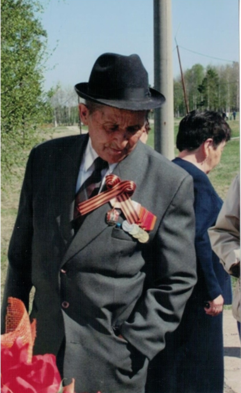 У памятника участникам Вов. д. Татлы Белорецкого района. Ветеран труда Газиз Ситдиков